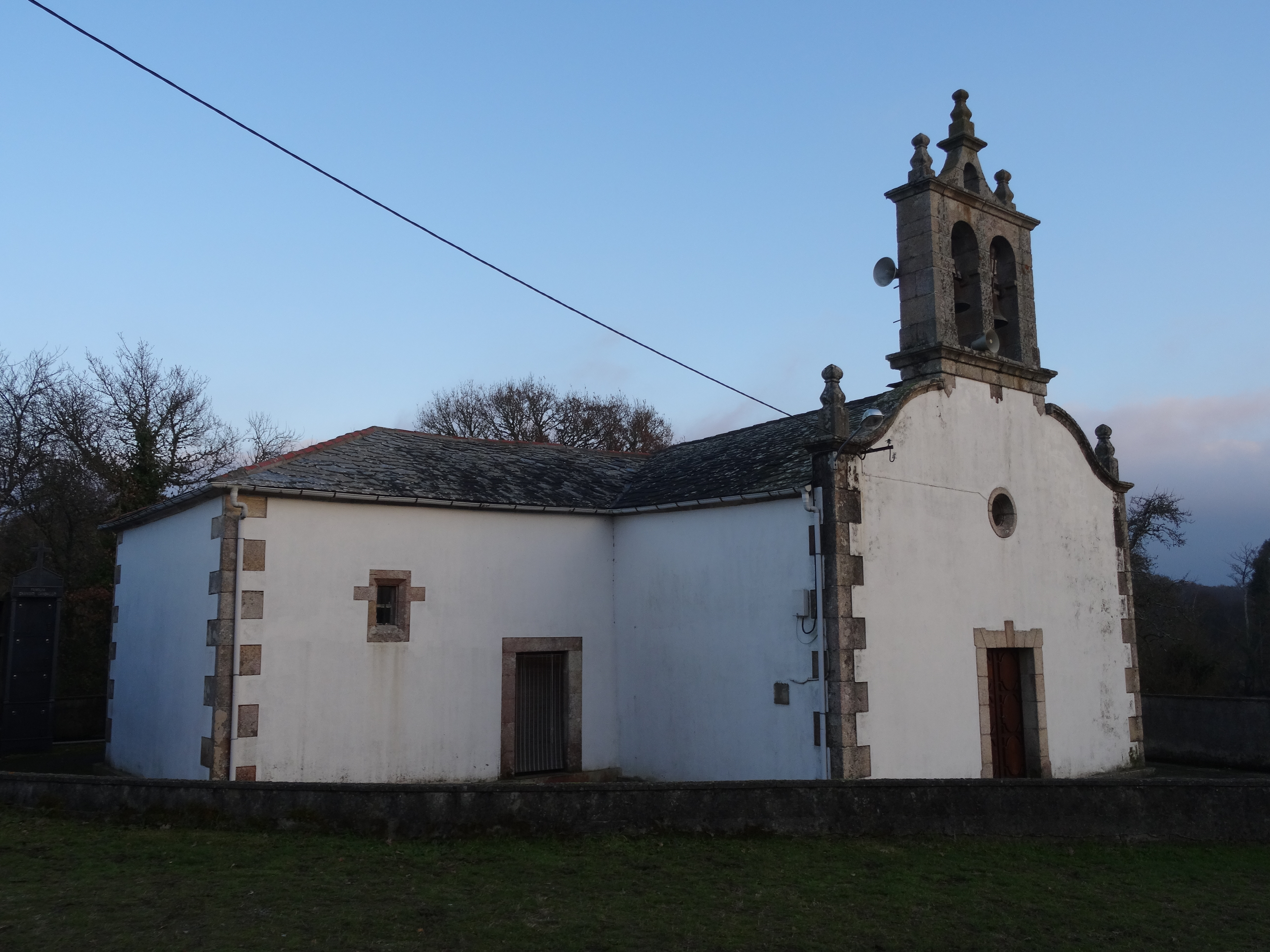 Ver título.